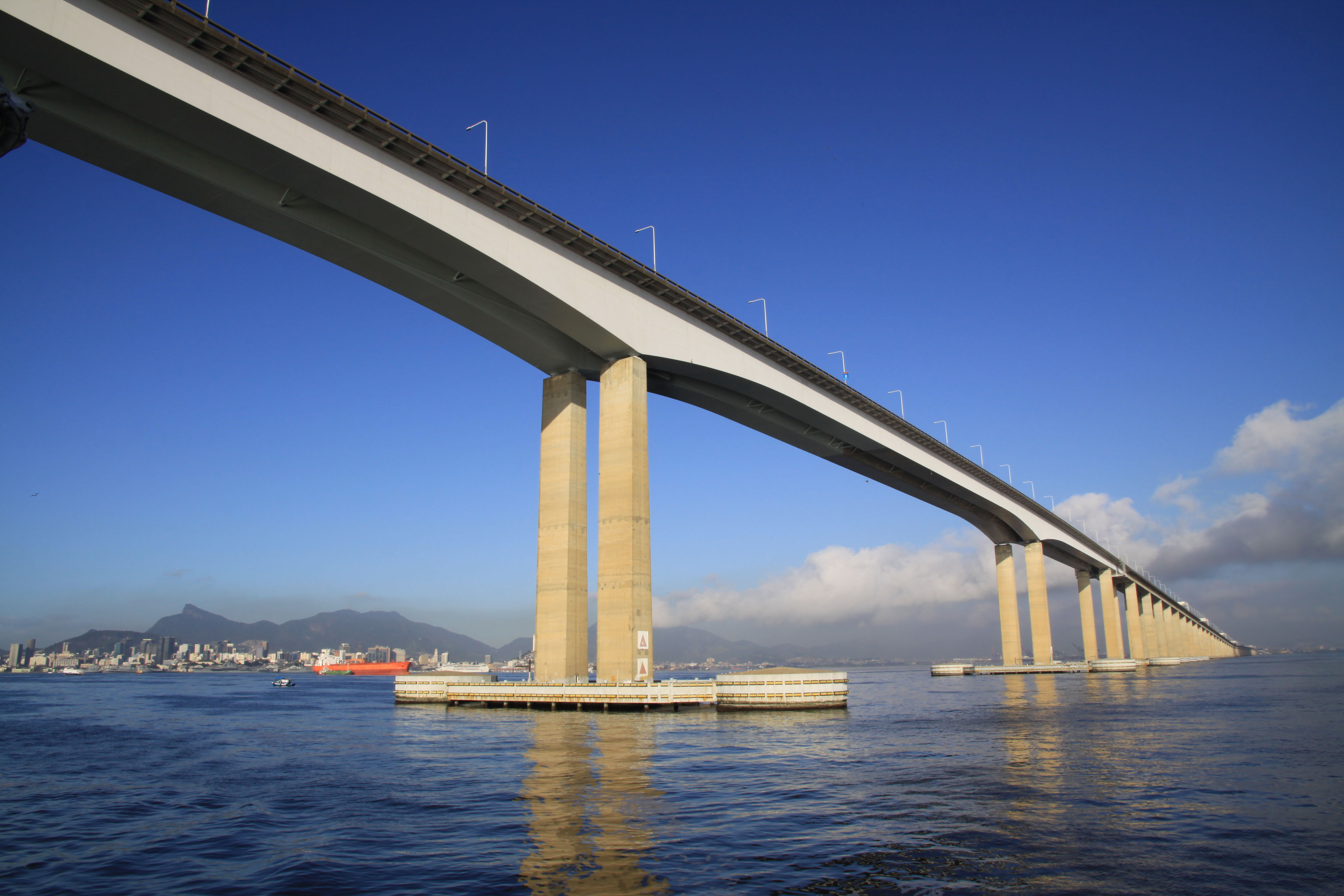 Ponte Rio-Niterói